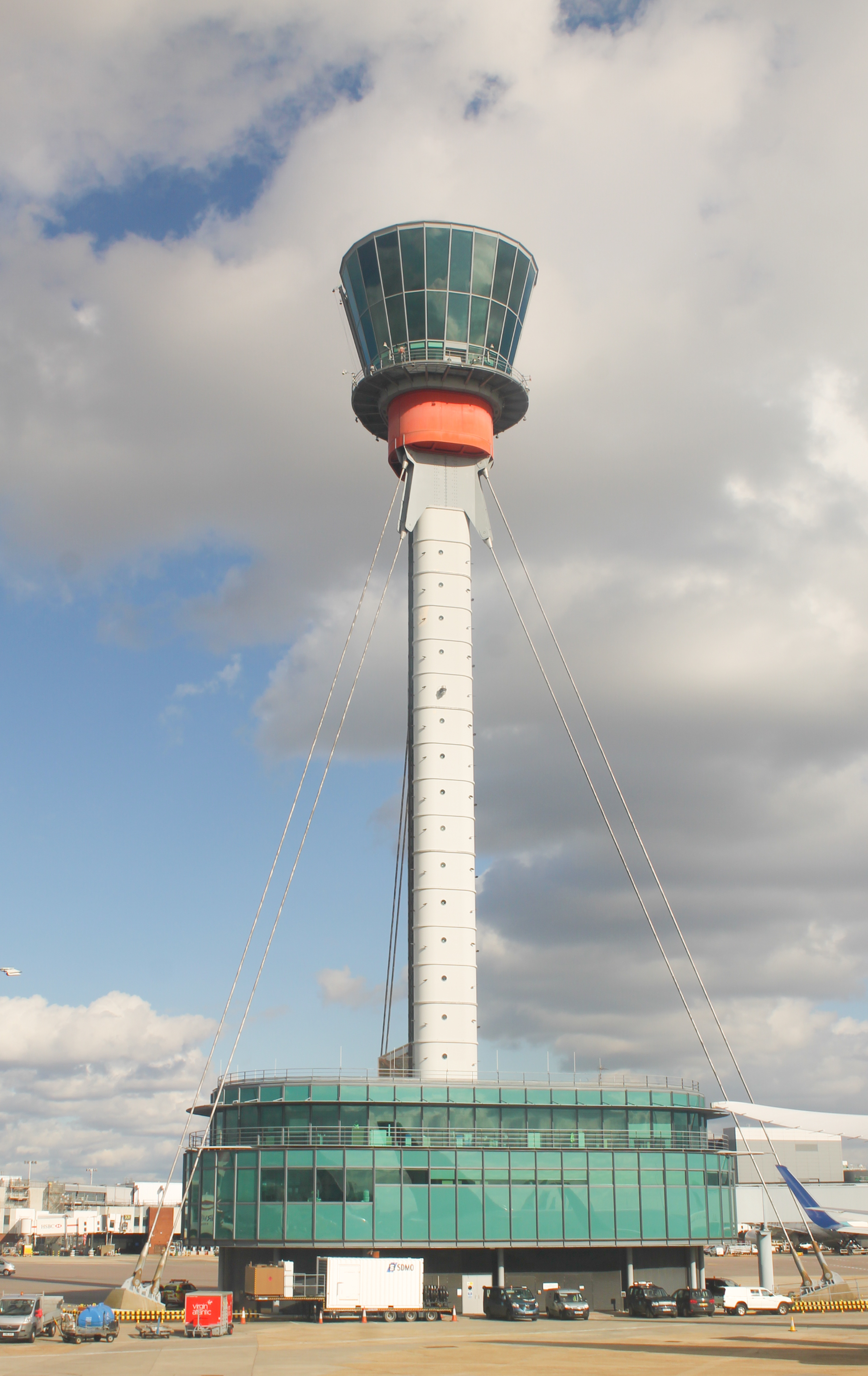 ロンドン・ヒースロー空港の管制塔(2018年3月8日撮影)